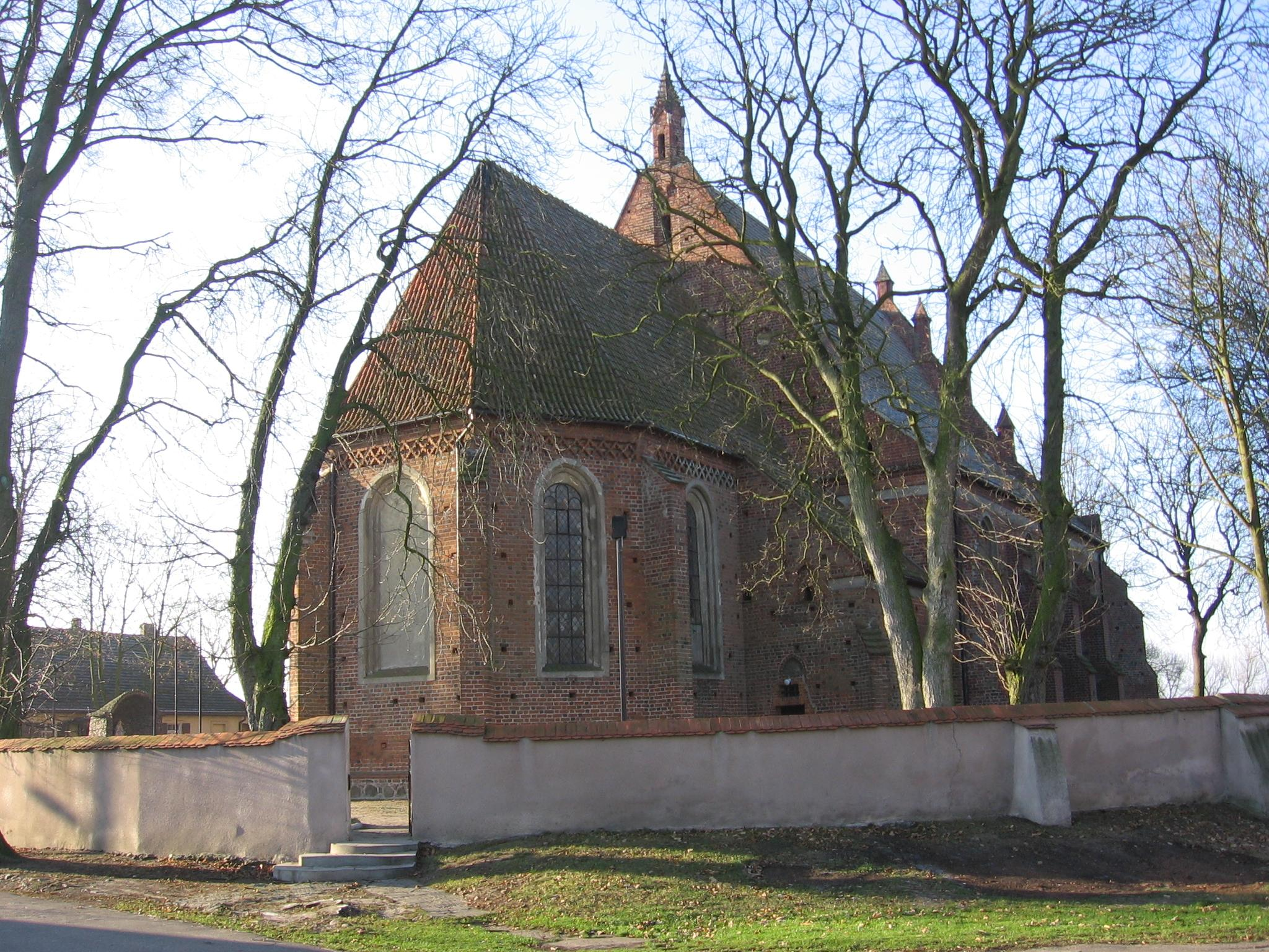 Łekno, ul. Poprzeczna - rzymskokatolicki kościół parafialny pw. św. Piotra i Pawła z XV w.